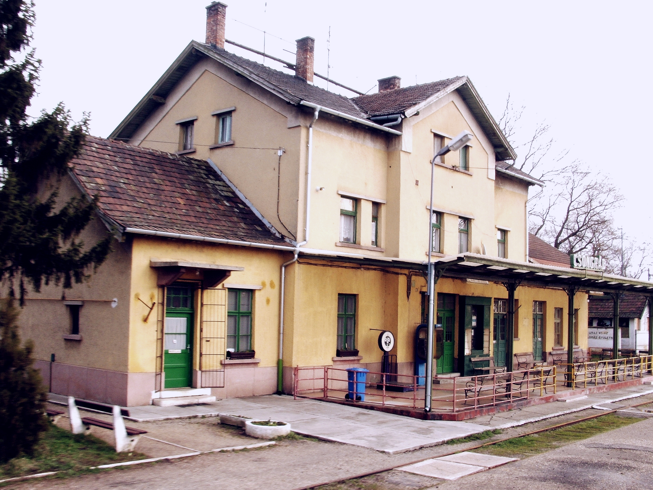 A csongrádi vasútállomás.